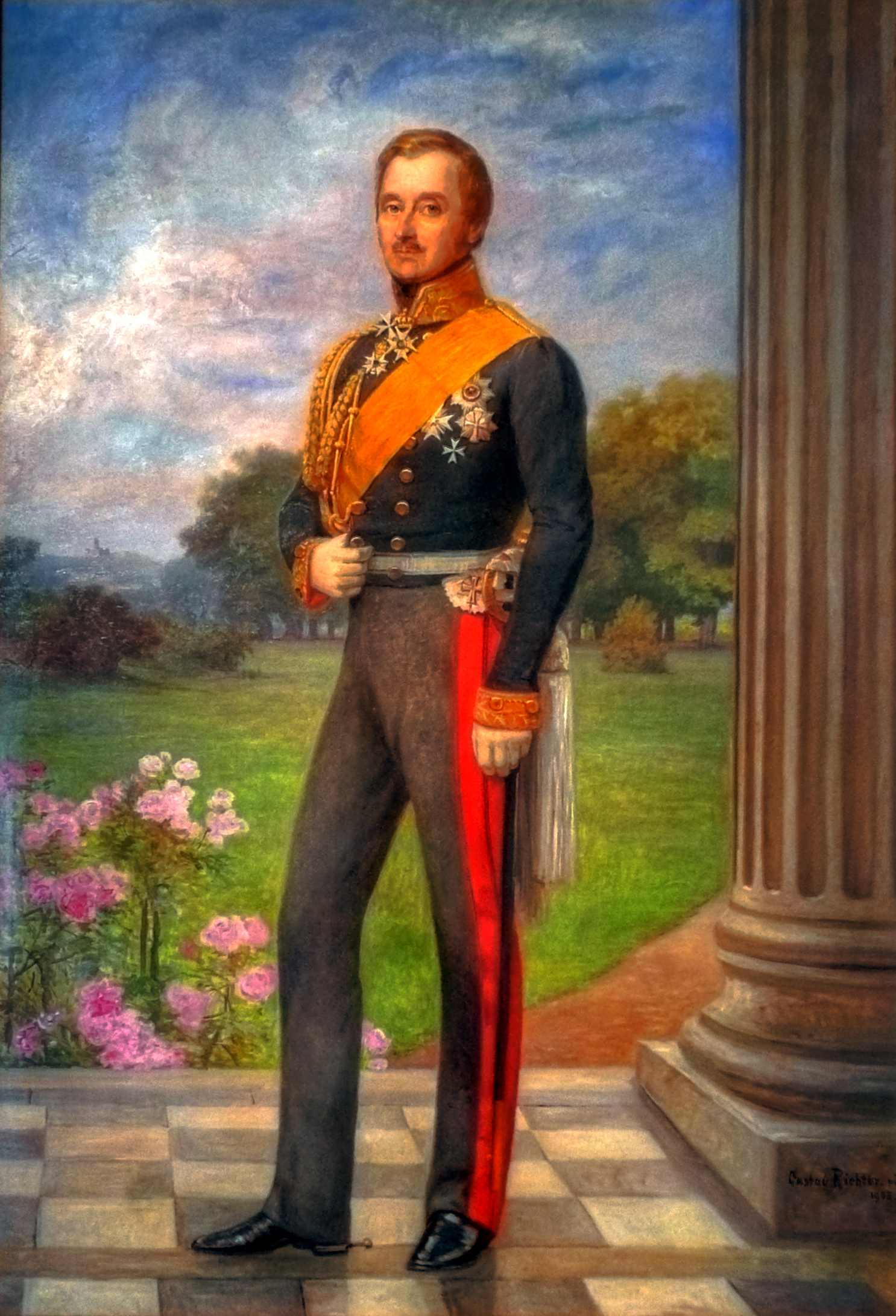 Wilhelm Malte I., Fürst zu Putbus, Öl auf Leinwand, Gustav Friedrich Wilhelm Richter (1847-1915), 1905, Jagdschloss Granitz